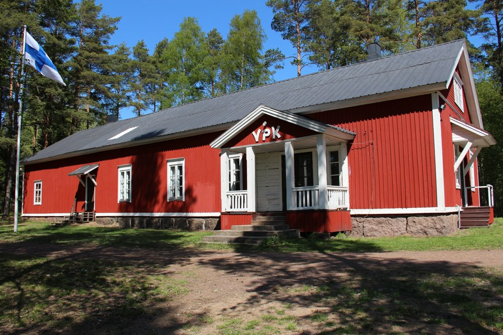 Virolahden vpk palokunnantalo